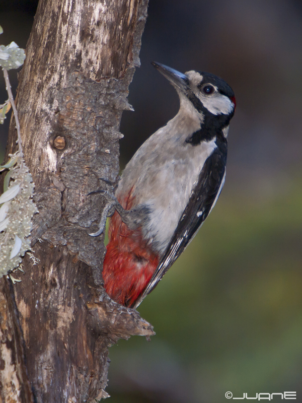 Pico Picapinos (Dendrocopos Major, thanneri)(♂)